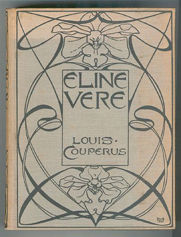 bandontwerp L.W.R. Wenckebach 1898, "Eline Vere", uitgever: P.N. van Kampen & Zoon